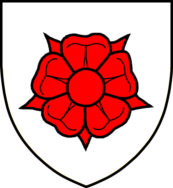 Vapensköld för norska Sudreimätten